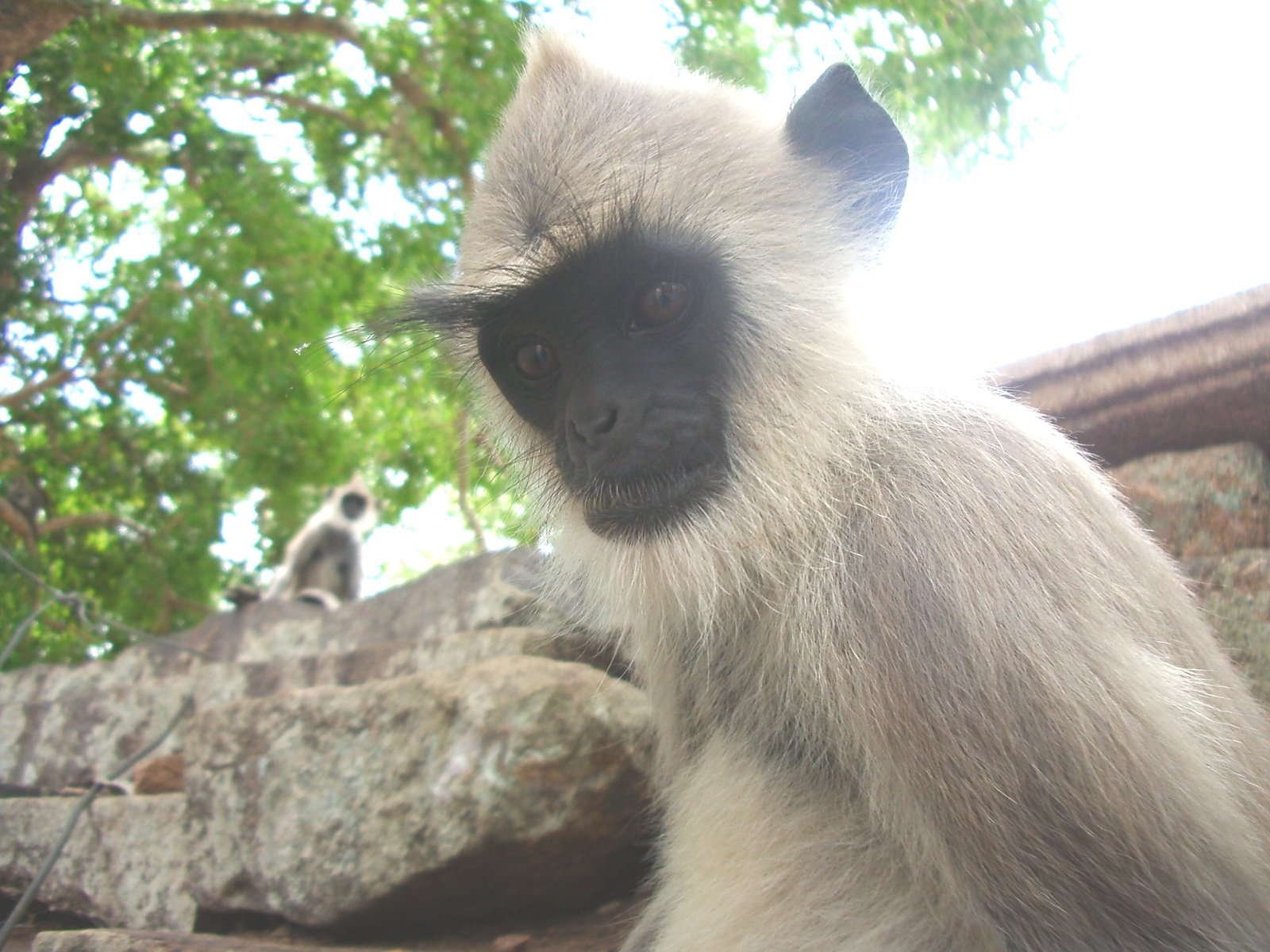 Mona d'Sri Lanka, foto feta per J. Ollé el juliol del 2006